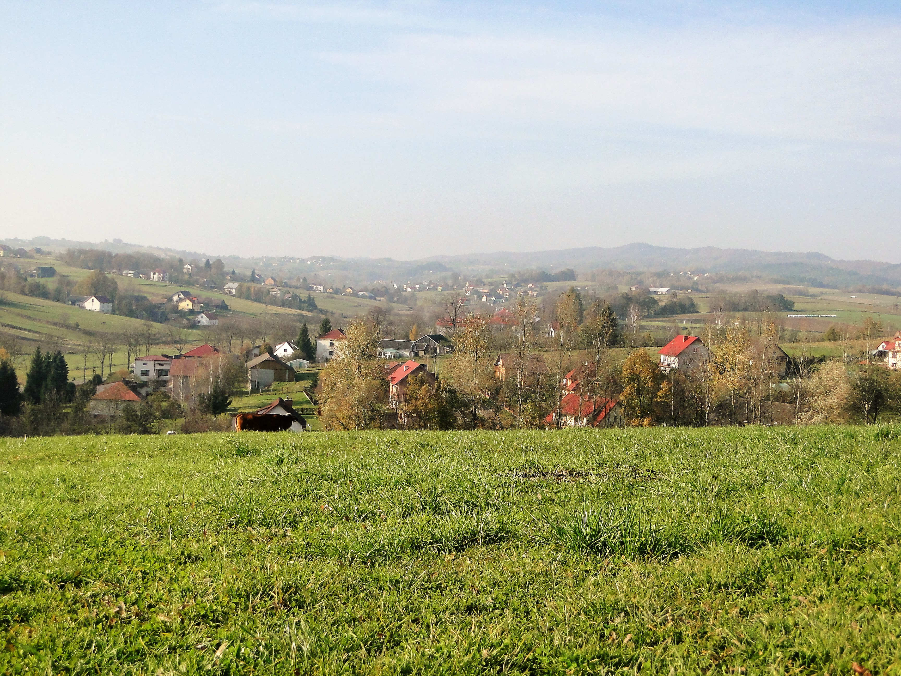 Widok na Olszyny